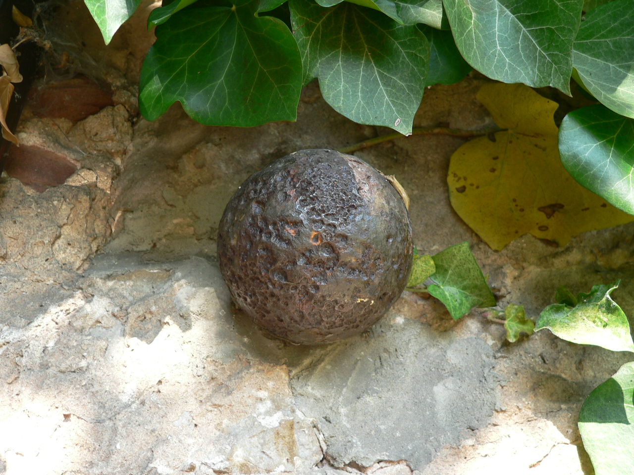 Gieselwerder, in der Weser gefundene Kanonenkugel aus der Zeit des Dreißigjährigen Krieges